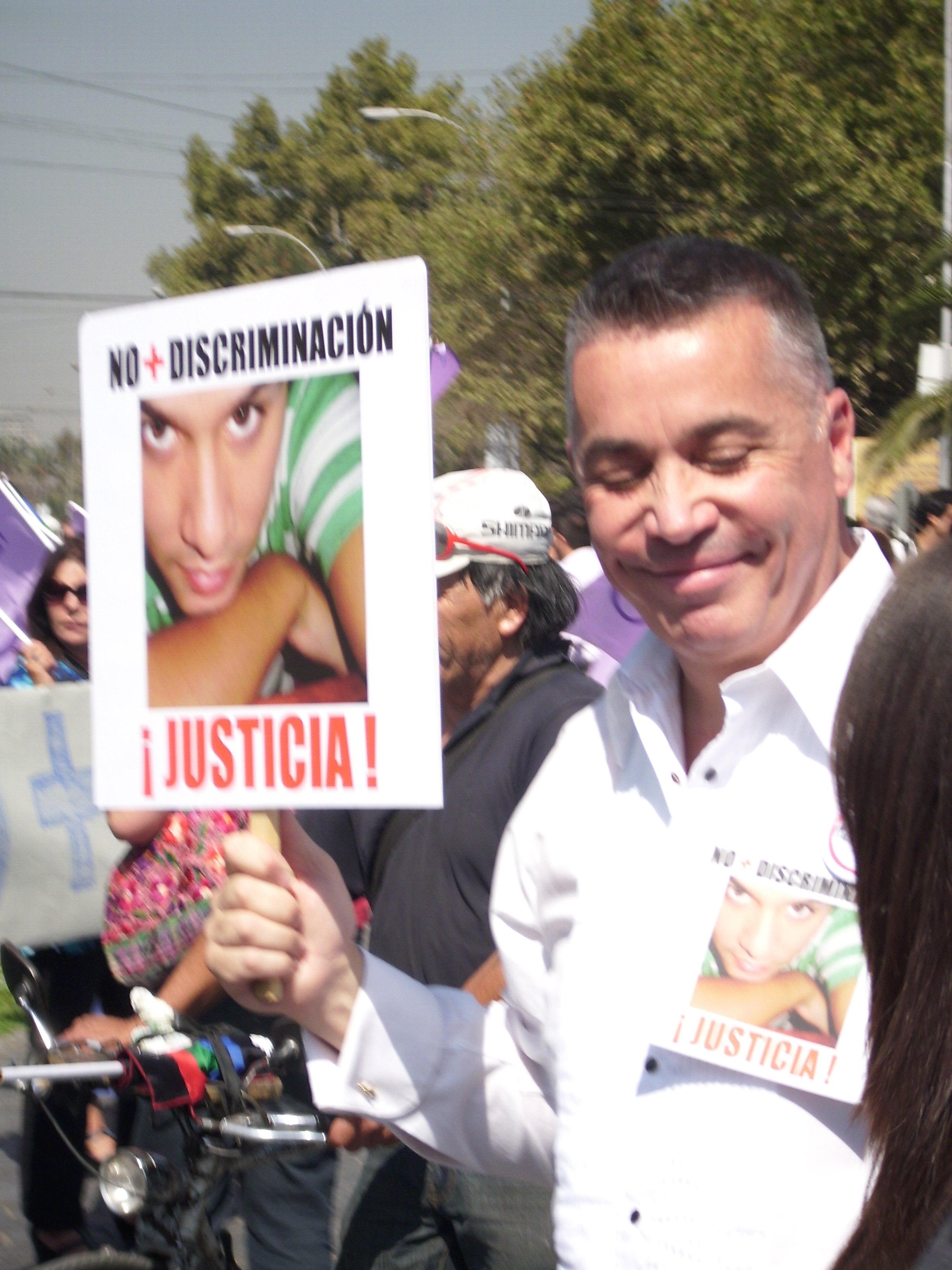 El productor de eventos Willy Geisse mostrando una pancarta en repudio a la discriminación de las minorías sexuales en Chile durante el funeral del joven Daniel Zamudio el 30 de marzo de 2012 en el Cementerio General de Santiago.